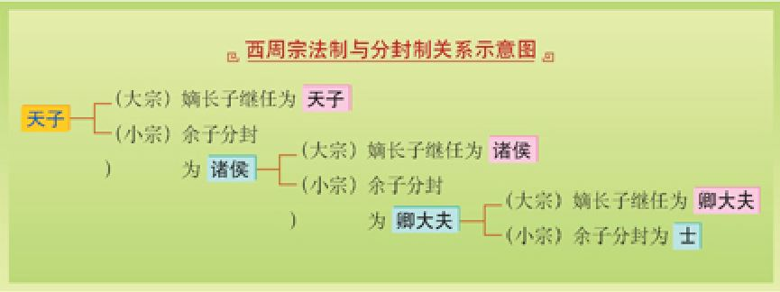 中文（中国大陆）: 西周的分封制与宗法制